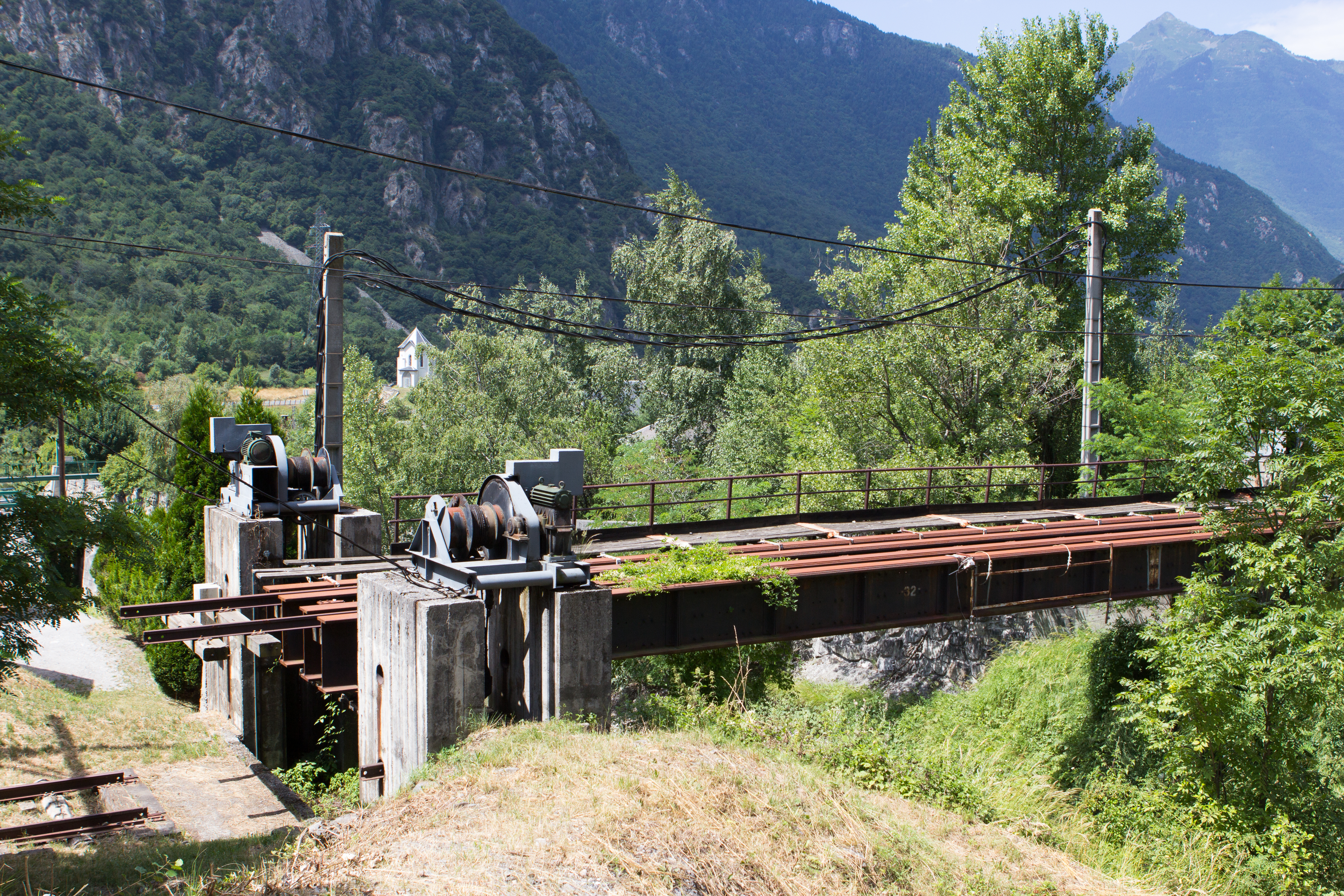 Ligne de la Maurienne - L'évitement de Pontamafrey - Pont levant au dessus du torrent la Ravoire - Commune de Pontamafrey-Montpascal, Savoie, France